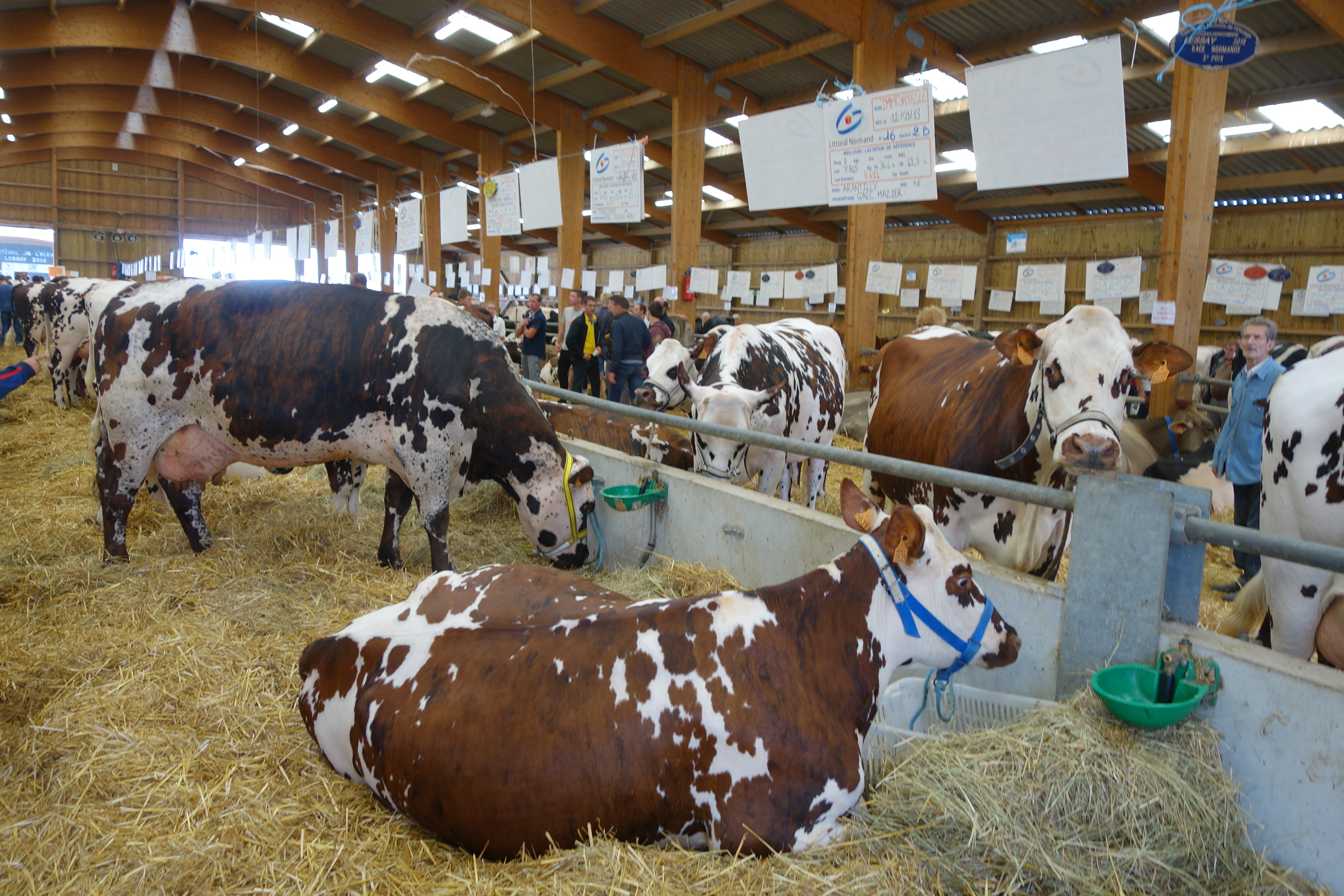 Foire de Lessay 2016. Bestiaux.